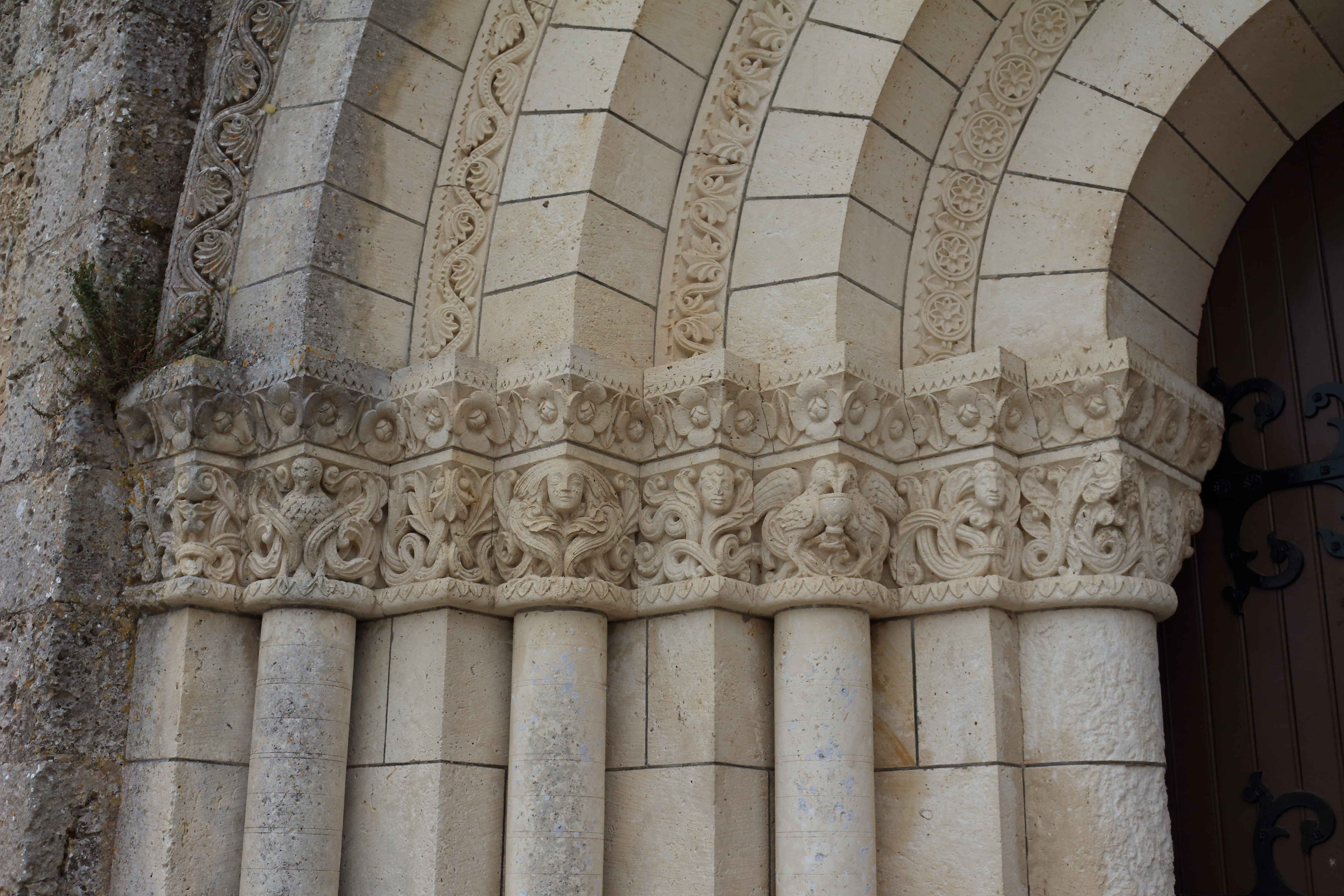 Détail du portail occidental de l'église Saint-Martin à Meursac, Charente-Maritime, Poitou-Charentes, France. .